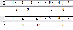 Taquets de tabulations / Tab stops